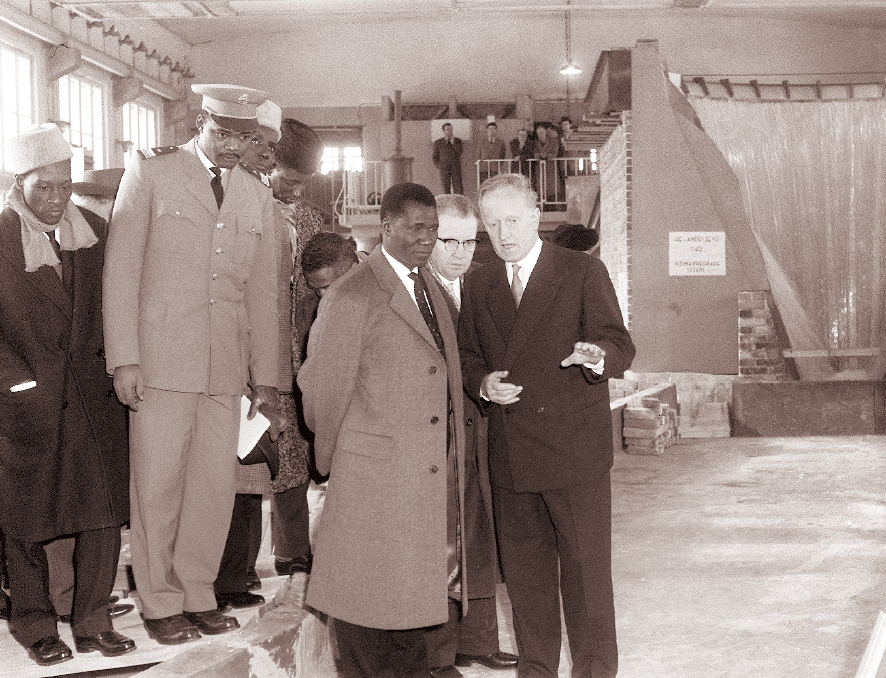 Ahmed Sékou Touré na obisku v Ljubljani.